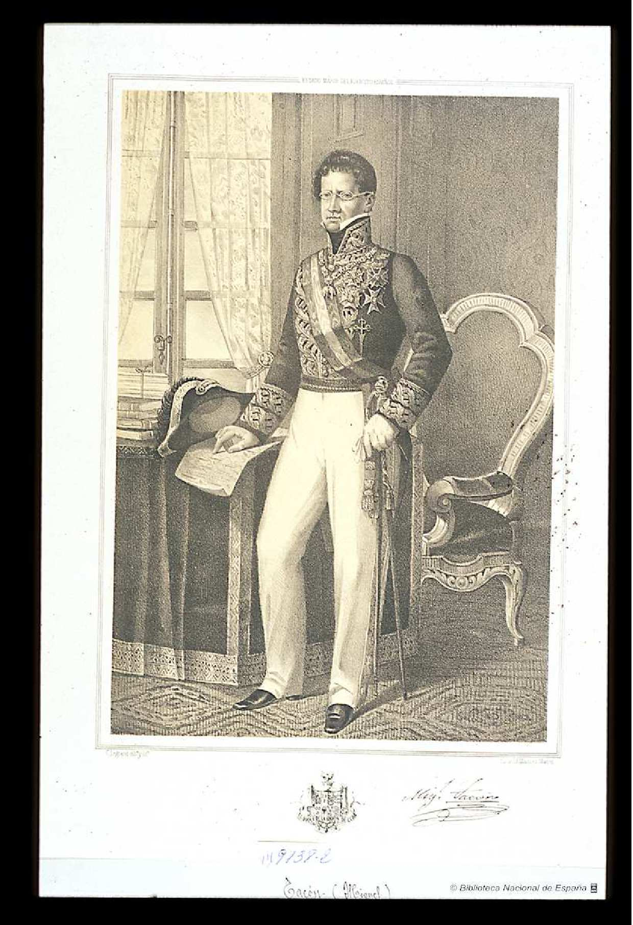 Retrato de Miguel Tacón, litografía de Luis Carlos Legrand para la obra de Pedro Chamorro y Baquerizo, Estado Mayor General del Ejército Español